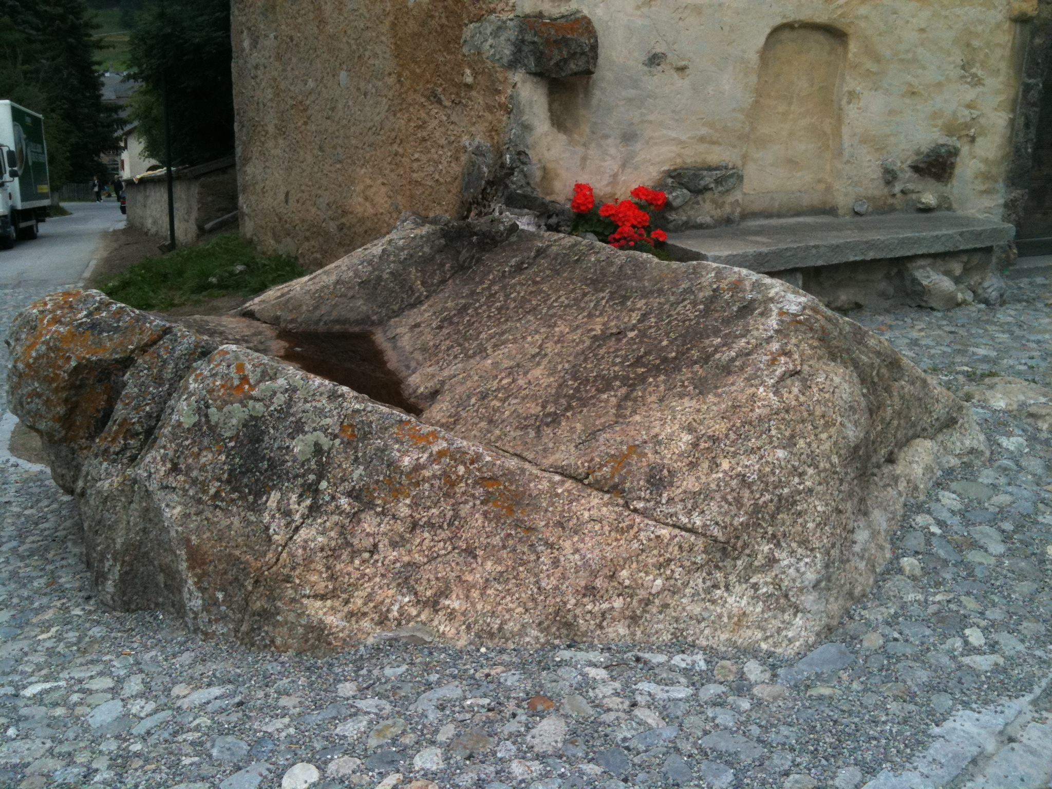 Stein aus heidnischer Zeit (Fruchtbarkeitssymbol) vor der Kirche San Bastiaun in Zuoz, Kanton Graubünden